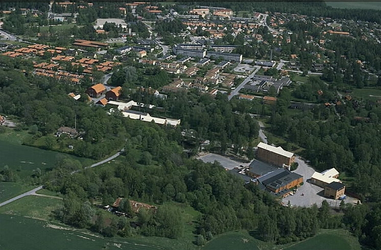 Motiv: Skultuna bruk Nyckelord: Flygbilder, Riksintressen Kategori: Bruksmiljö.